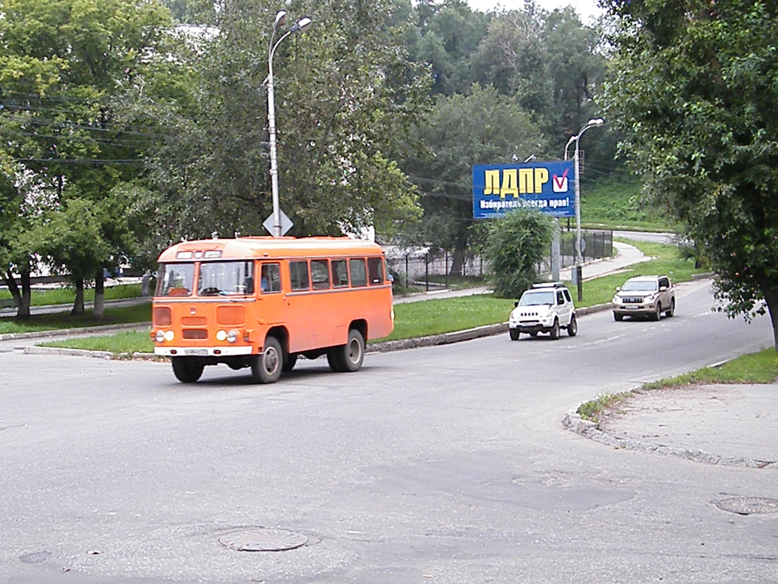 Автобус ПАЗ-3201